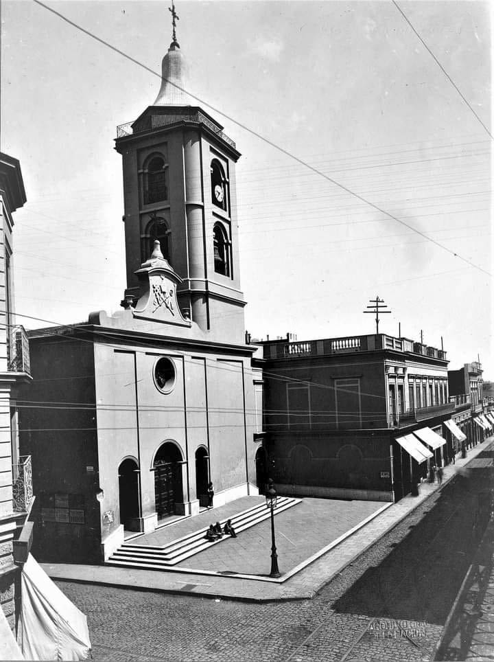 Iglesia de San Nicolás de Bari, Buenos Aires, a fines del siglo XIX. Demolida en 1936